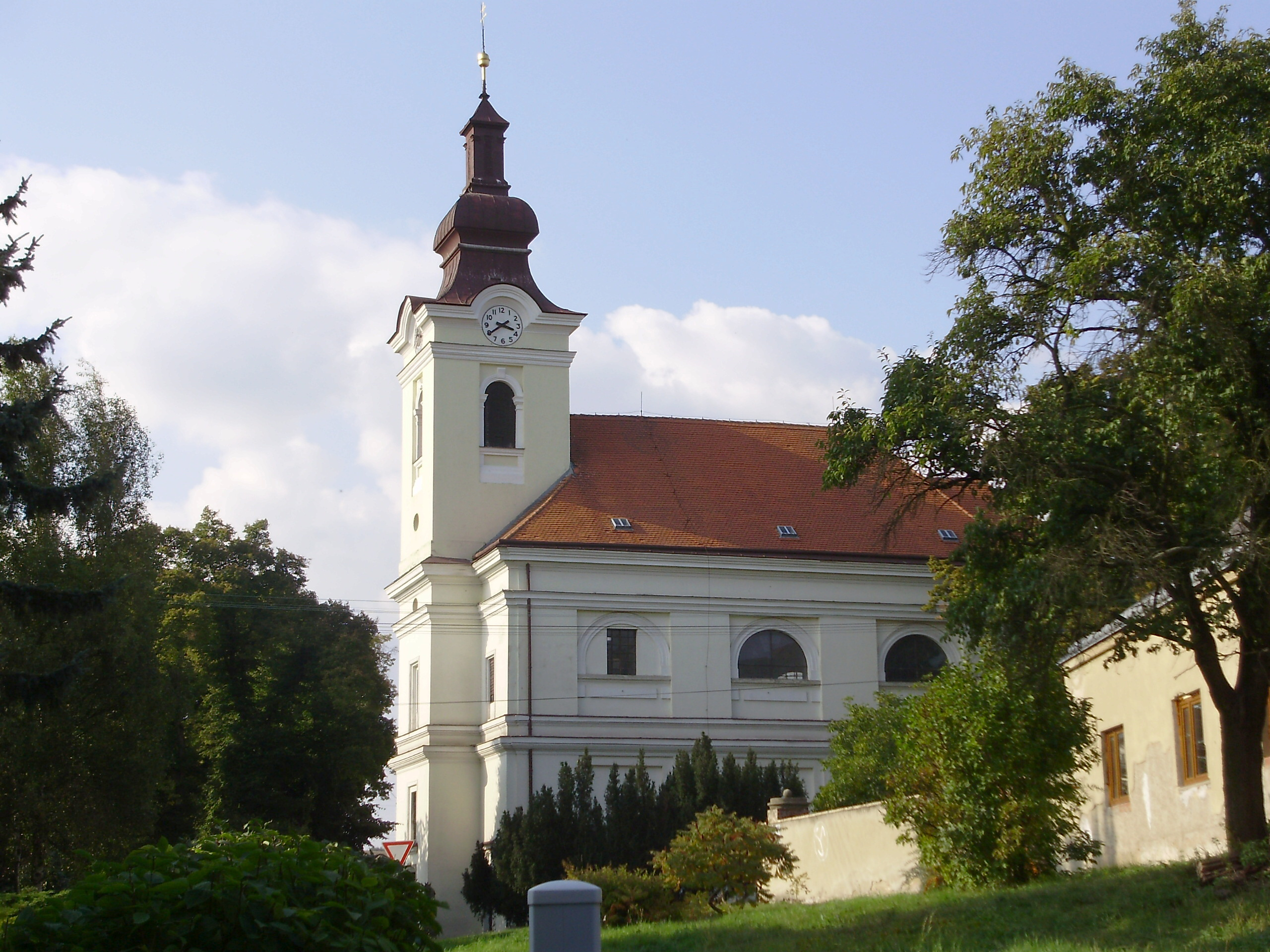 Farní kostel Nanebevzetí Panny Marie Bohdalice (Vyškov- Czech republic)